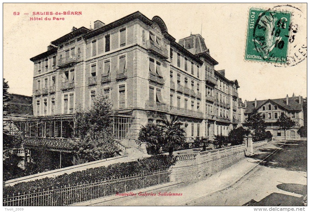 Photographie de l'hôtel du parc du Casino de Salies-de-Béarn en 1952.